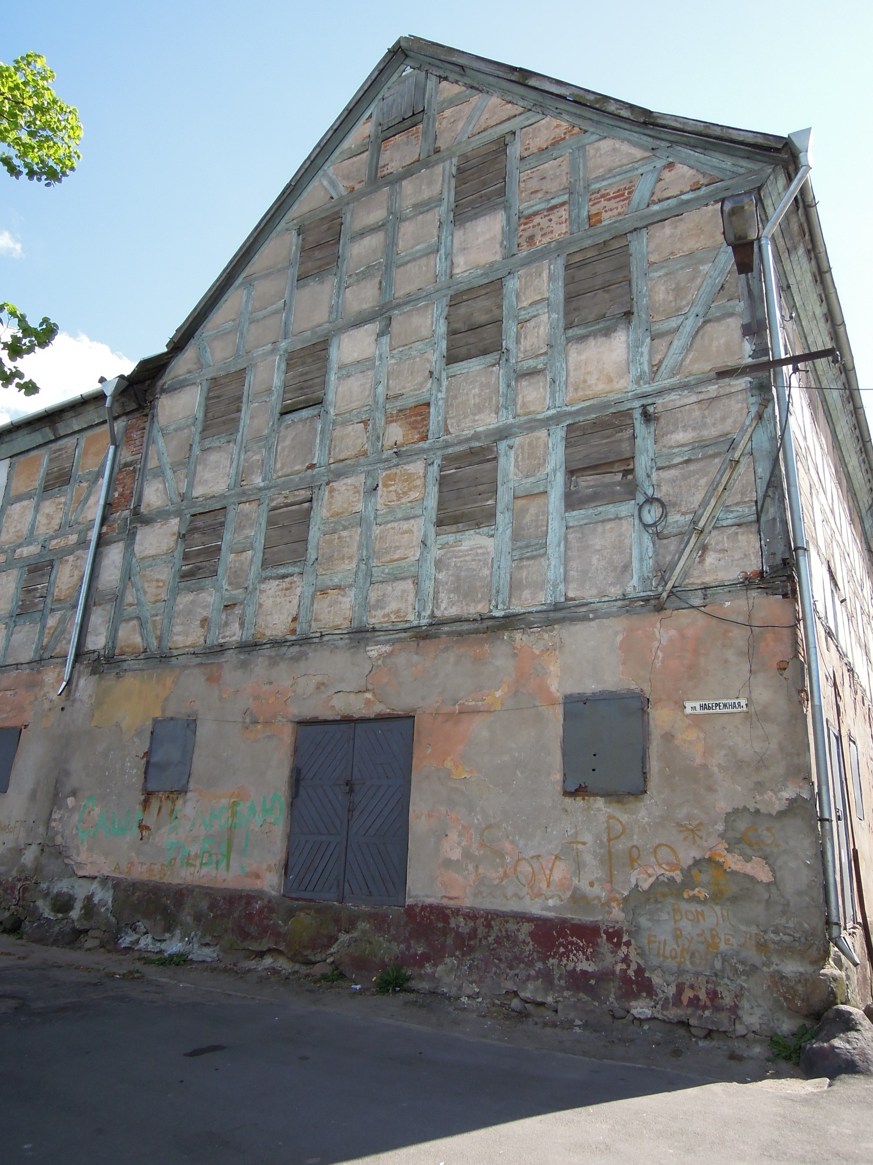 Фахверк в Советске Калининградской области.